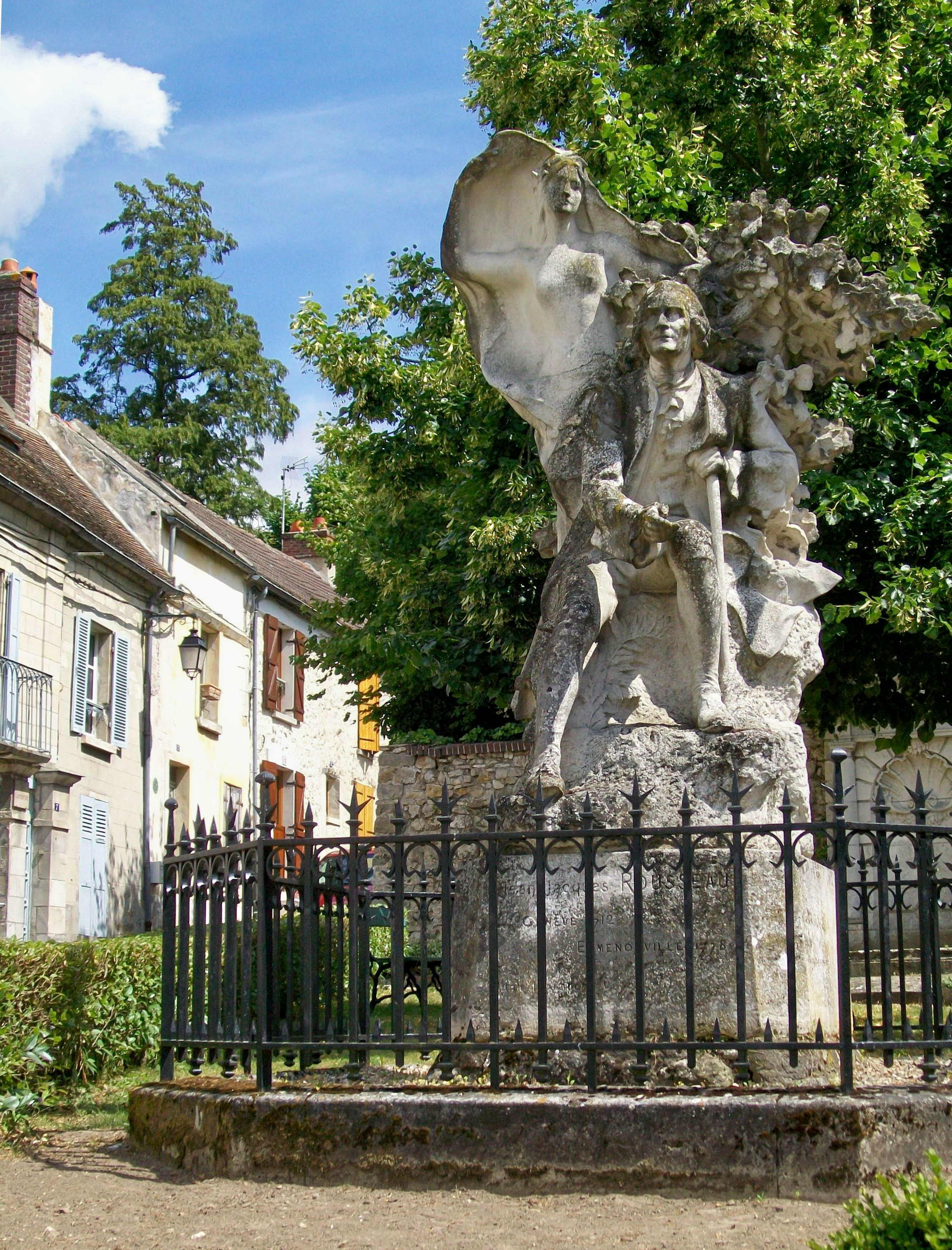 Le monument dédié à Jean-Jacques Rousseau sur la place qui porte son nom, au centre d'Ermenonville. Sculpteur Henri Gréber, 1907